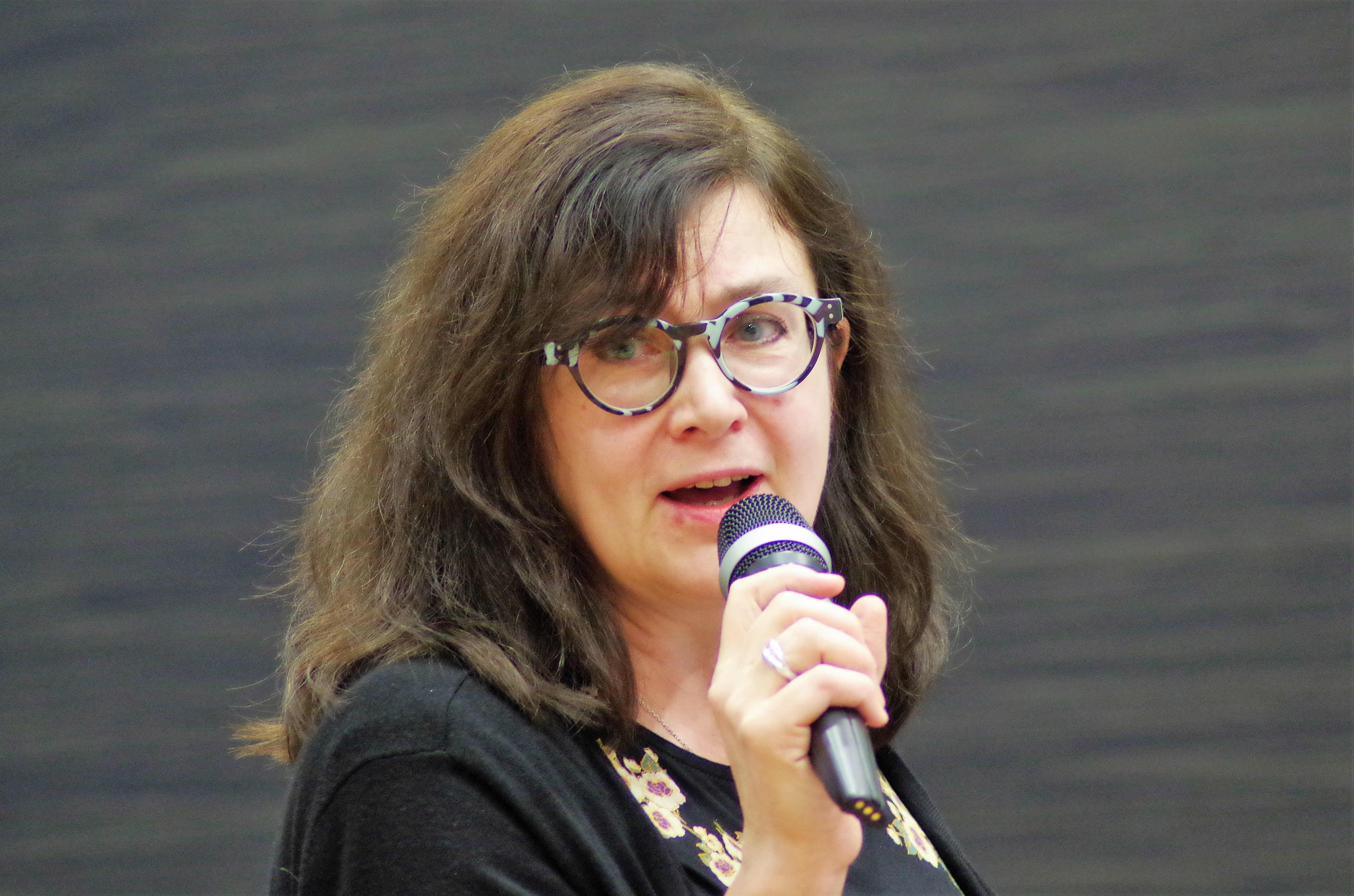 Kärt Summatavet, eesti ehtekunstnik